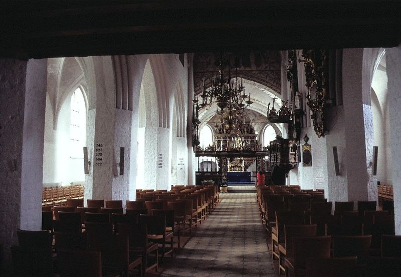 Vordingborg Vor Frue Kirke i Danmark. Skibet set mod øst